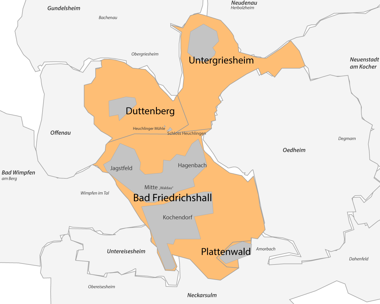 Lage der Stadtteile Bad Friedrichshalls